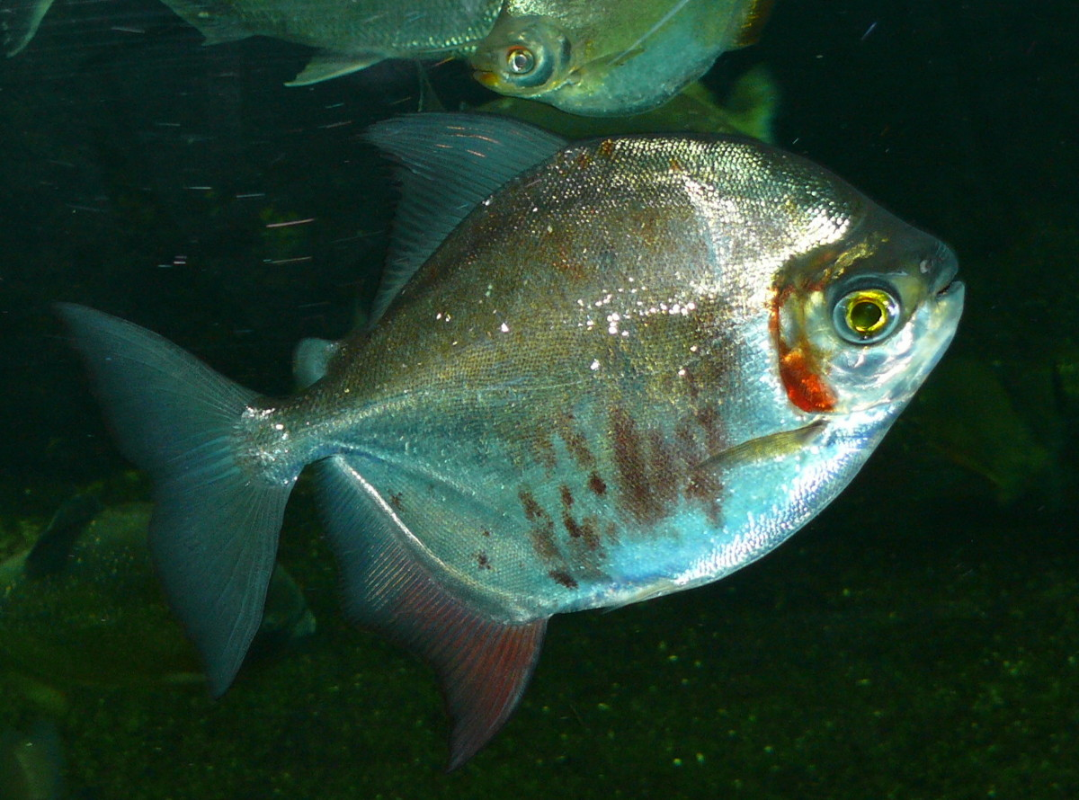 Myleus sp.